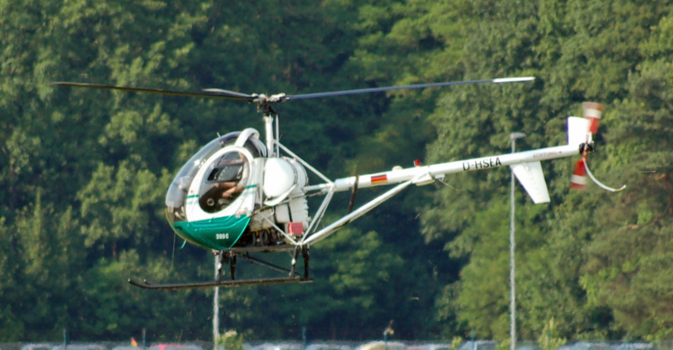 Hughes 300C (D-HSEA) auf dem Flugplatz Uetersen